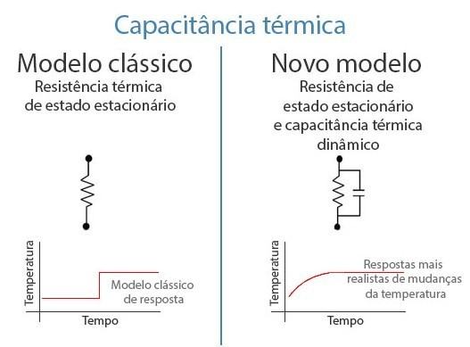 Comparação entre tecnologias